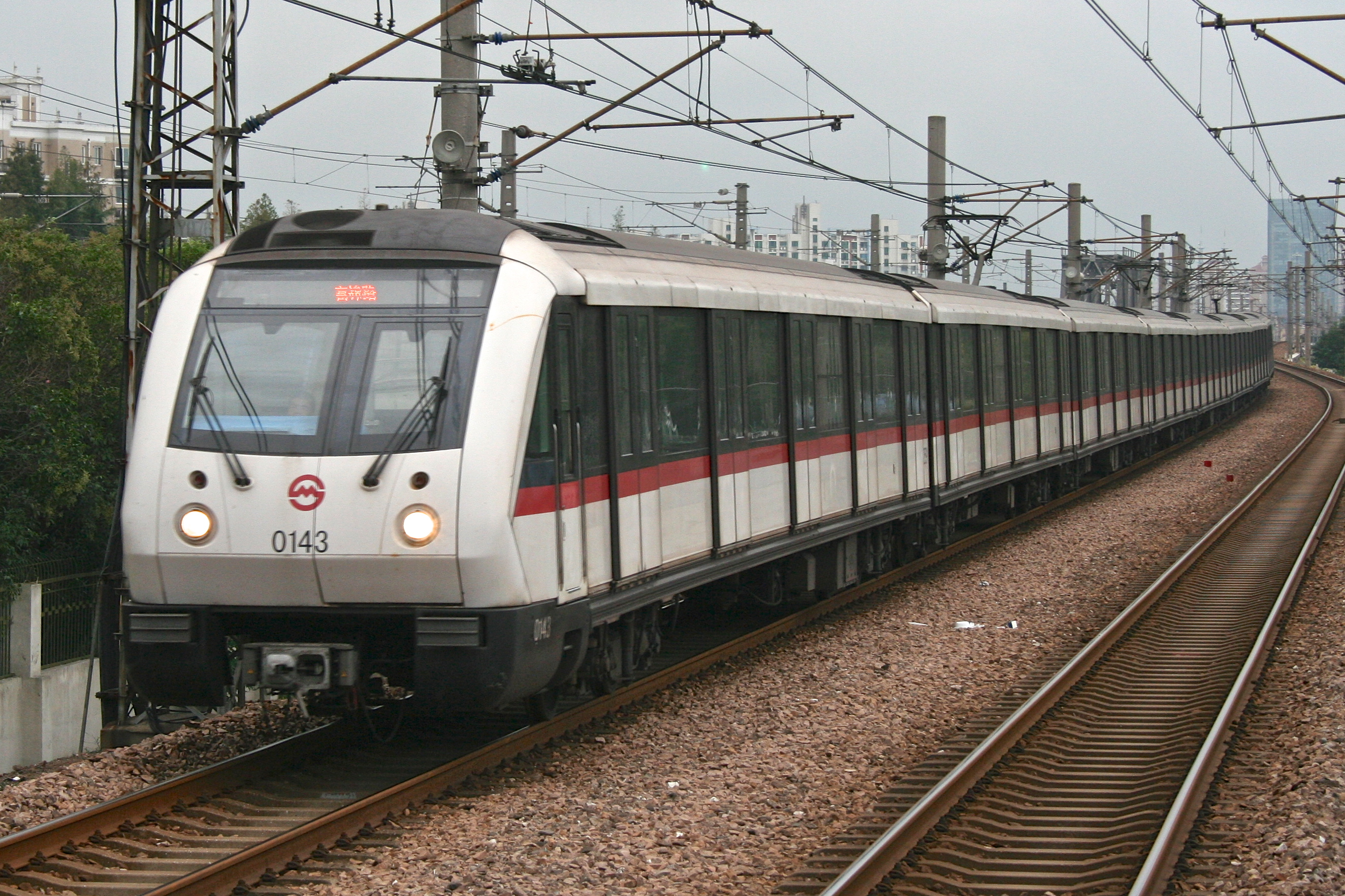 上海軌道交通１号線車両